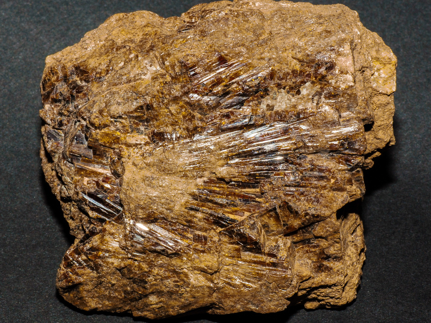 Přírodní památka – U cihelny, Hazlov u Aše, minerál vesuvian, sběr 1975, okres Cheb